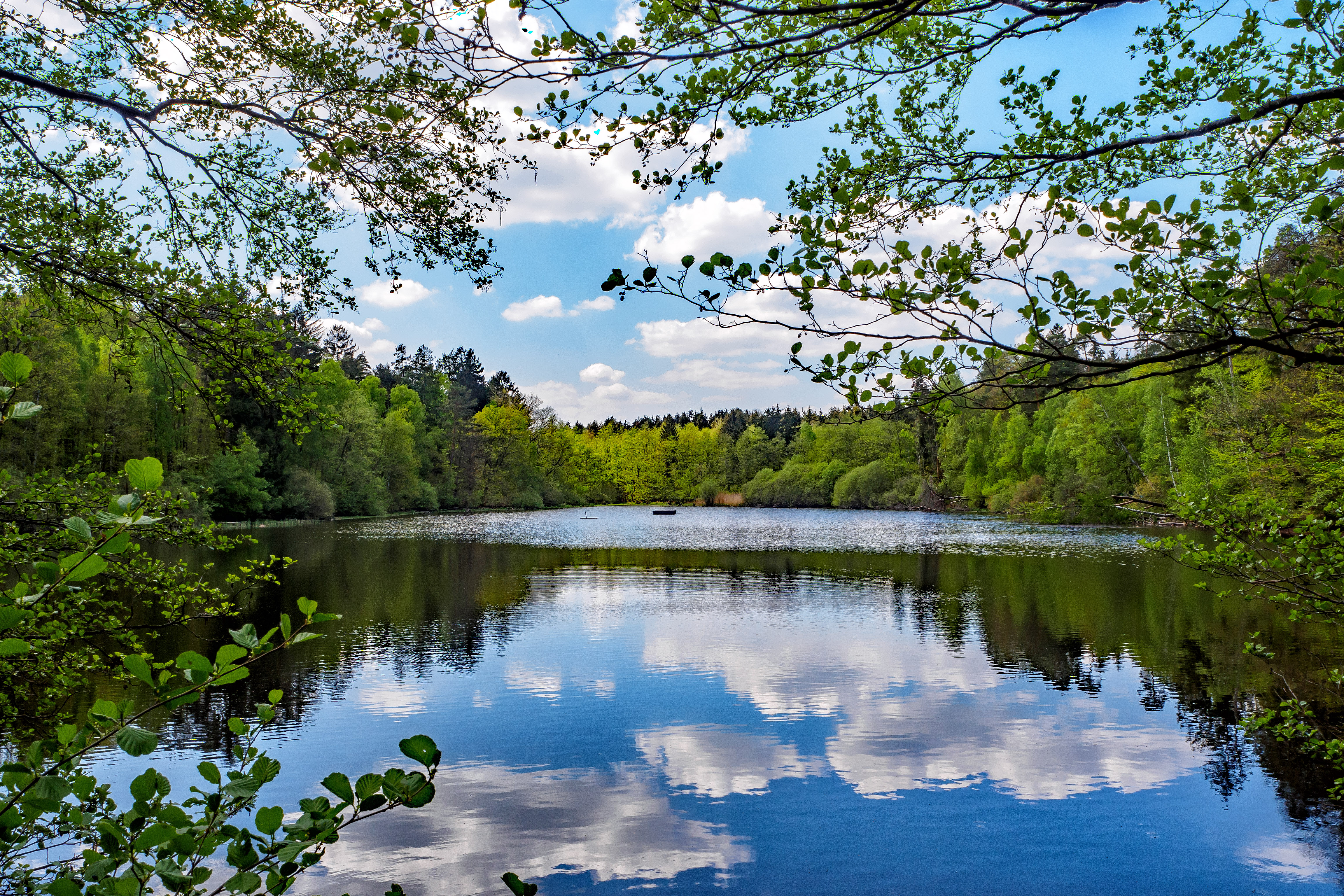 Spickelweiher im Naturschutzgebiet „Jägersburger Wald/Königsbruch“ (NSG-109)